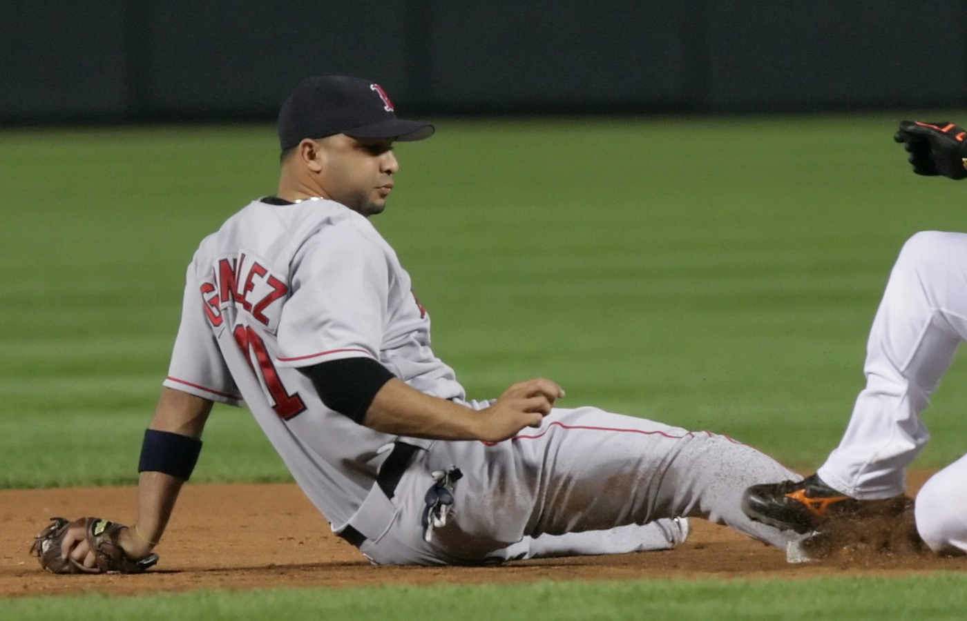 Álex González